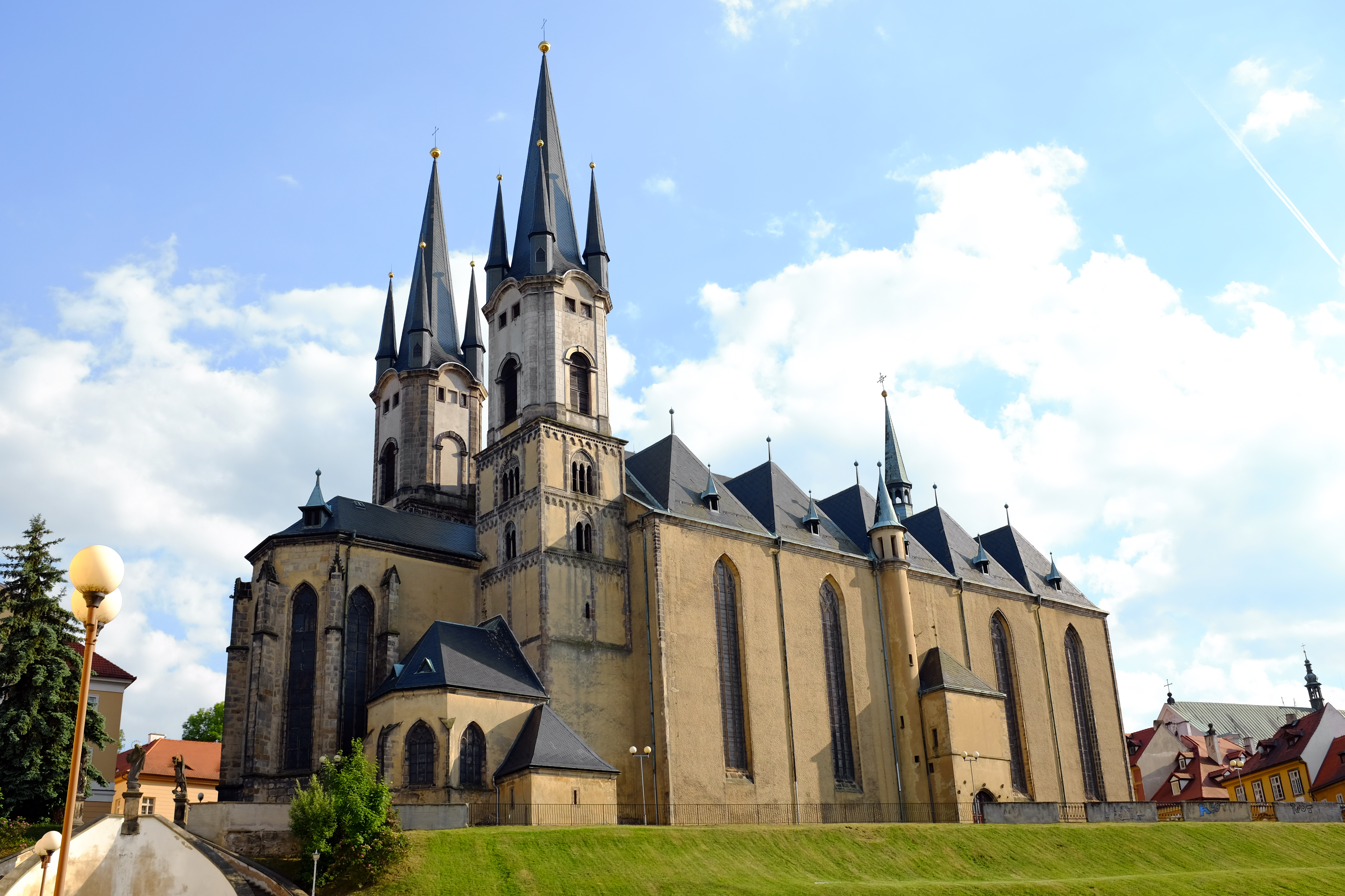 Kostel svatého Mikuláše, Kostelní náměstí 187/13, Cheb.